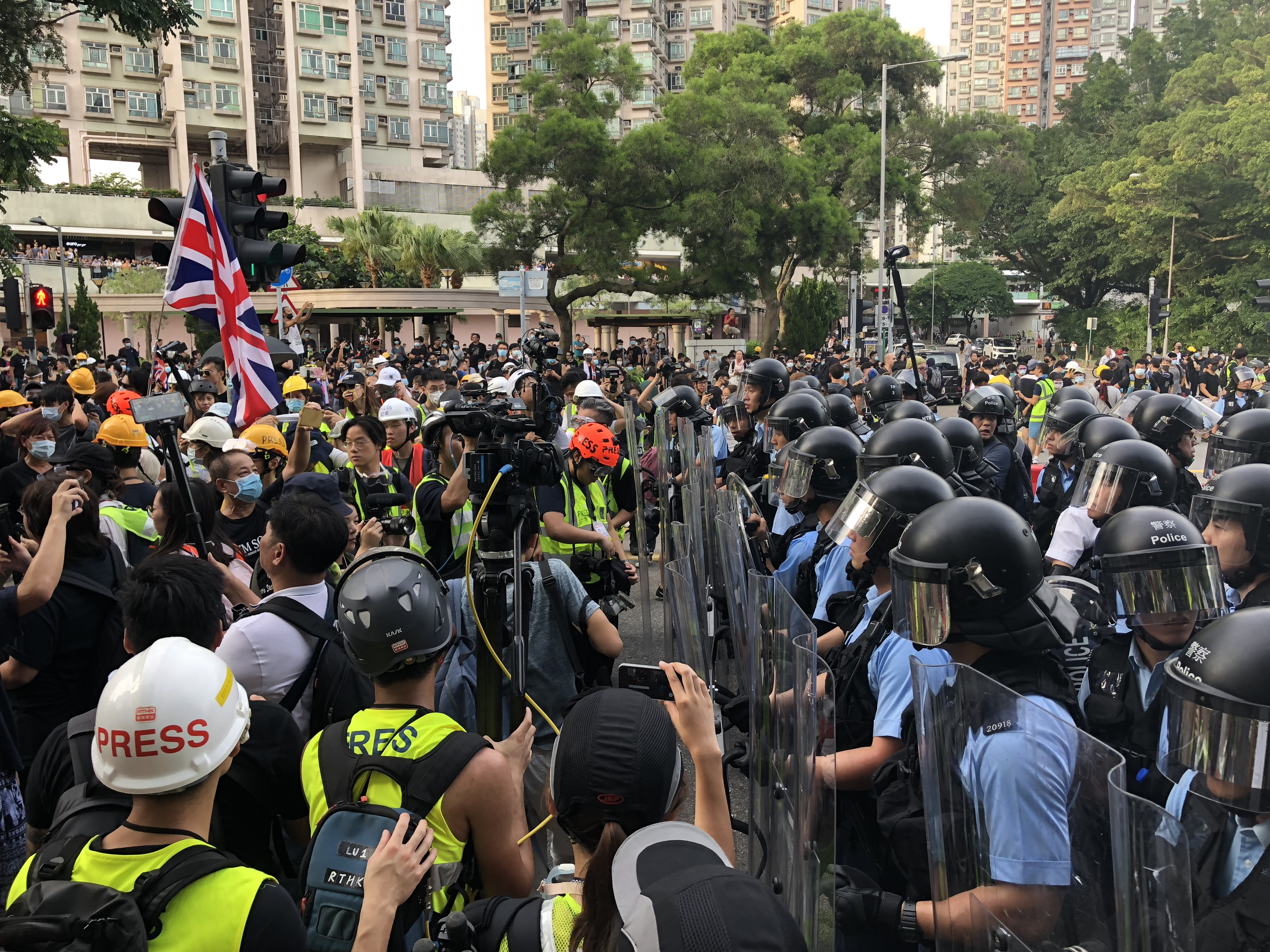 示威者包圍藥房，大批防暴警察介入再次爆發警民衝突，多名示威者受傷。